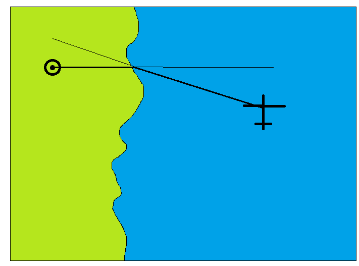 schets van het "breken" van een radiosignaal over water